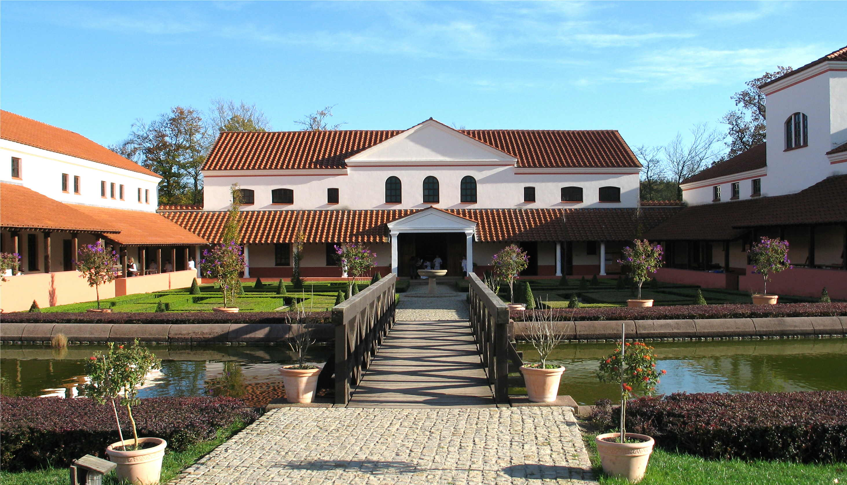 Réimesch Villa zu Borg am Saarland